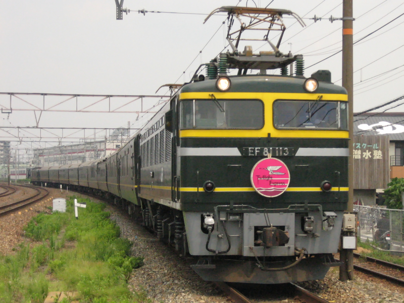 2006年8月11日に岸辺駅で投稿者が撮影。JR西日本EF81形、寝台特急「トワイライトエクスプレス」を牽引する113号機。